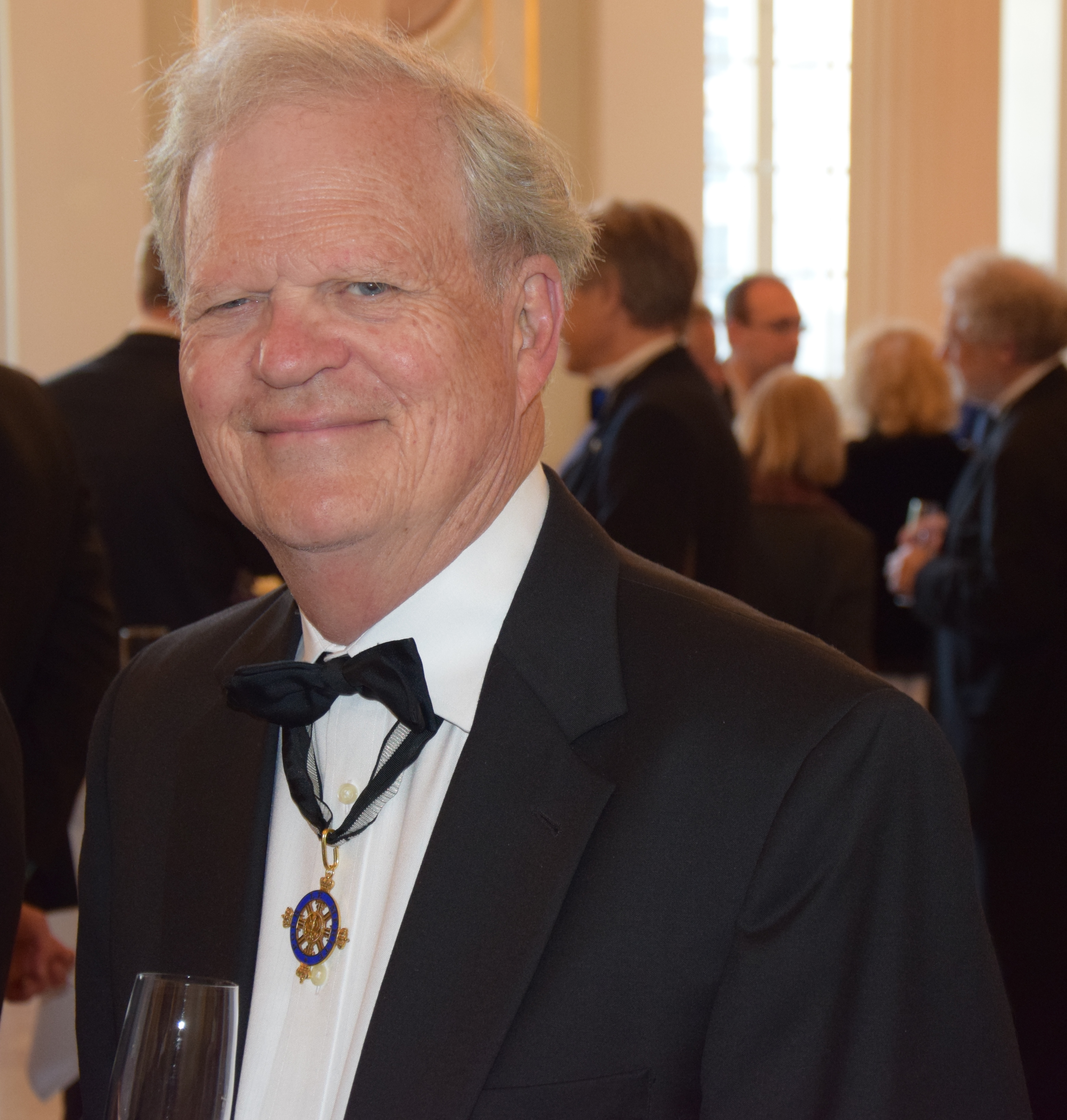 Öffentliche Sitzung der Mitglieder des Ordens Pour le mérite für Wissenschaften und Künste 2014 im Konzerthaus am Gendarmenmarkt in Berlin